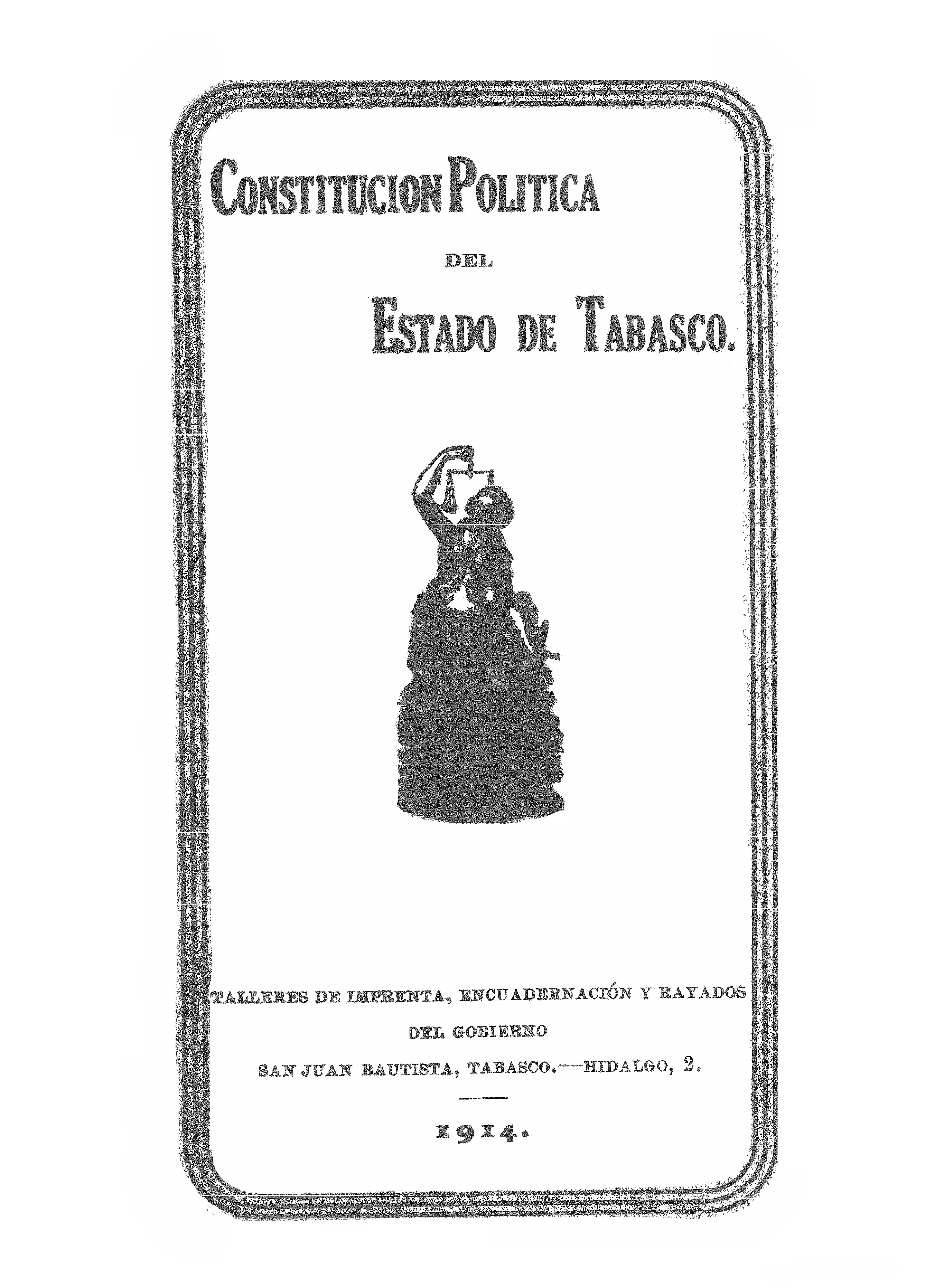 Portada de la séptima Constitución del Estado de Tabasco, promulgada el 15 de septiembre de 1914 por el gobernador Luis Felipe Domínguez, siendo la primera Constitución de México que plasmaba algunos de los preceptos de la Revolución mexicana.